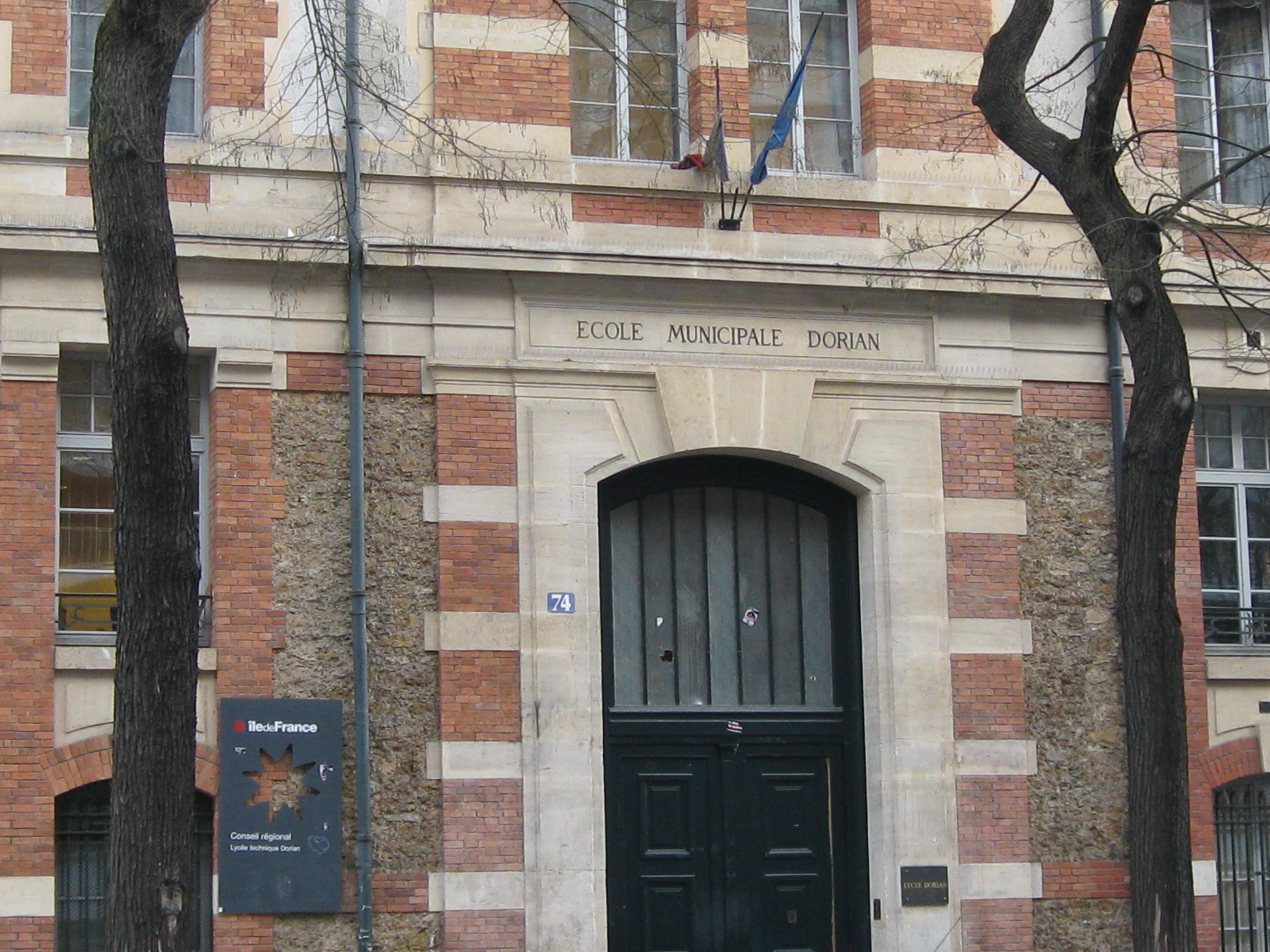 Entrée principale du lycée Dorian, au 74 avenue Philippe Auguste dans le XIe arrondissement de Paris.